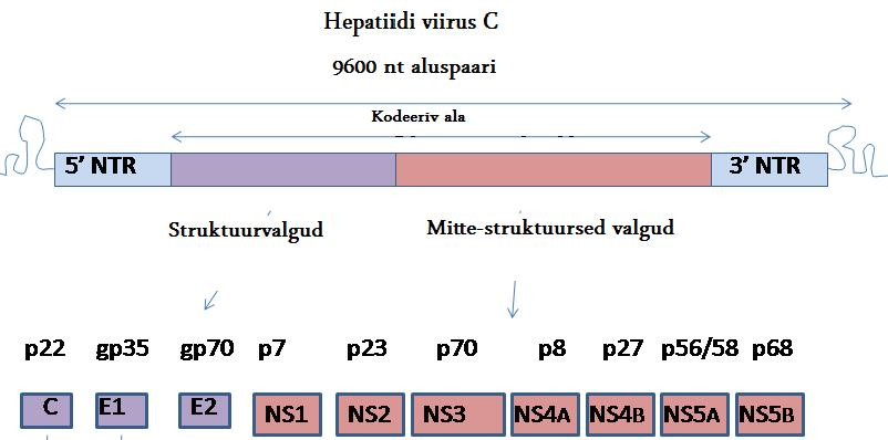 HCV genoom